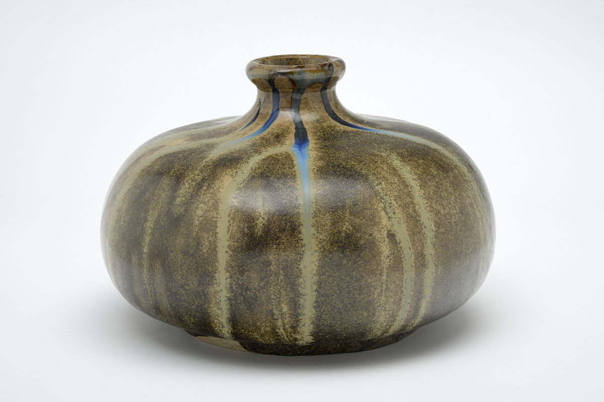 Vase boule en grès émaillé localisé au Musée des Arts et Métiers de Hambourg